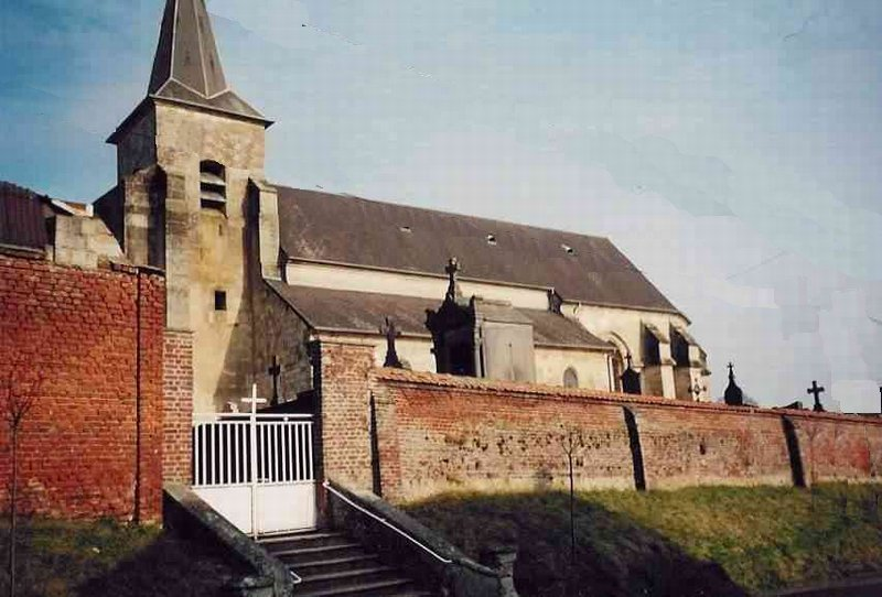 L'Eglise vue de la place, photo prise par manque de recul